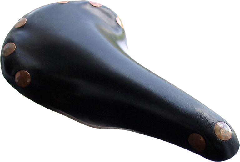 Fahrradsattel der Firma Brooks, Typ Professional für Einsatz an hochwertigen Renn- oder Reiserädern. Dies ist das Spitzenmodell des einzigen bedeutenden Herstellers von Ledersätteln weltweit.